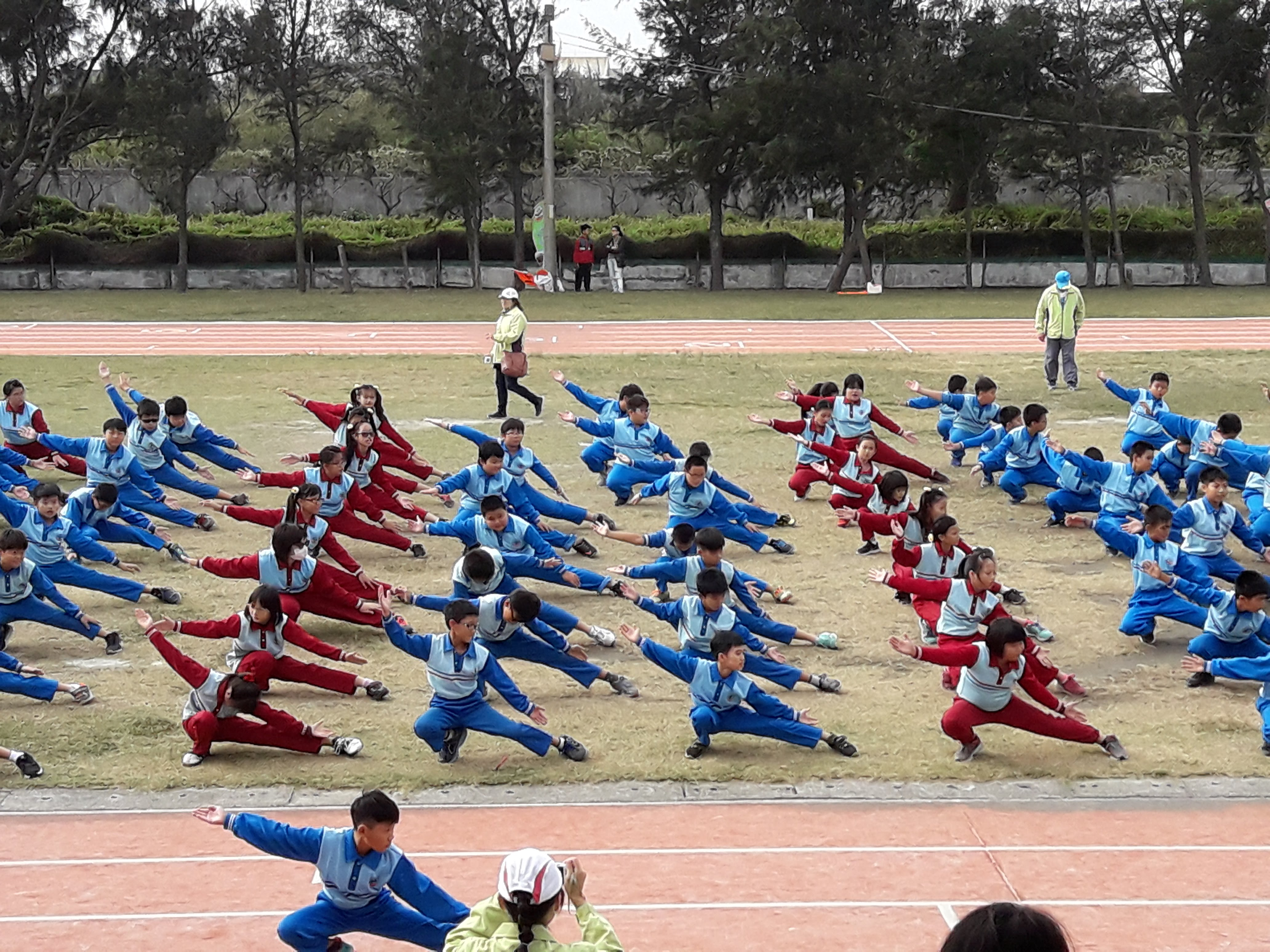 崙豐國小運動會時表演中國武術的學生們。